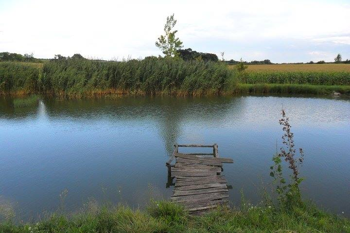 Mezőföli környezet Hencsén az Éri-patak környékén